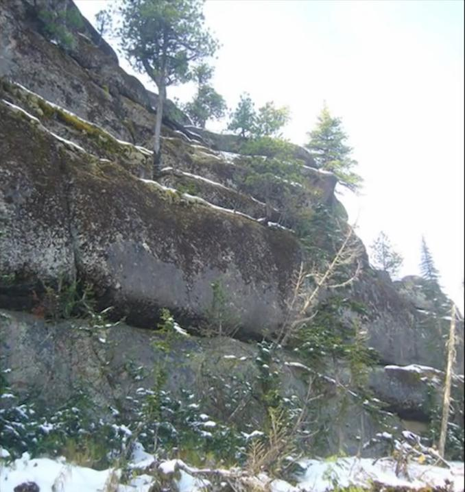 Камни заросли мхом, травой и деревьями